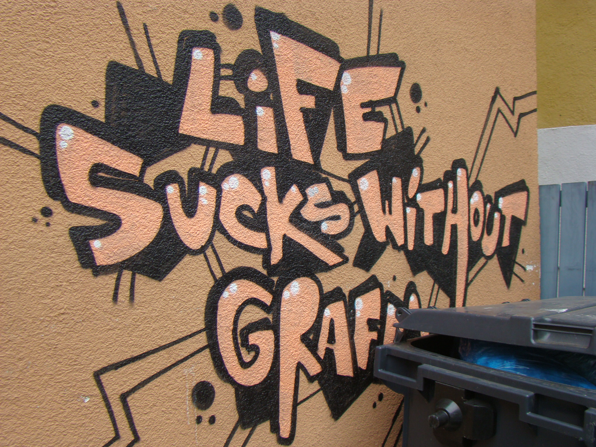 Grafitti in der Zehentgasse in Heilbronn